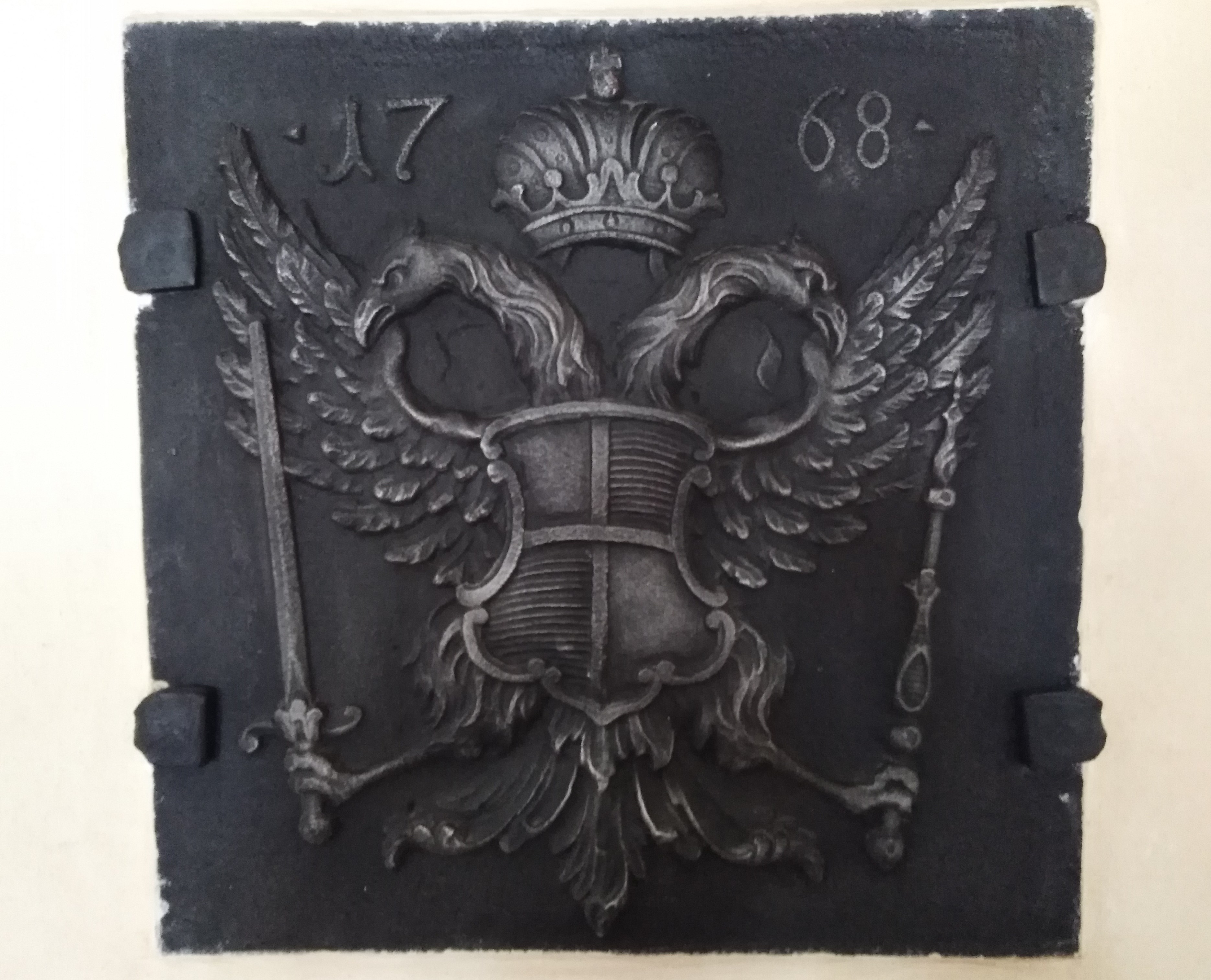 Gasthaus Adler in Lauchringen im Landkreis Waldshut in Baden-Württemberg. Ersterwähnung im Habsburger Urbar 1308. Im Gasthaus: Wappen mit Doppeladler der Kaiserlichen Reichspost, 1768.